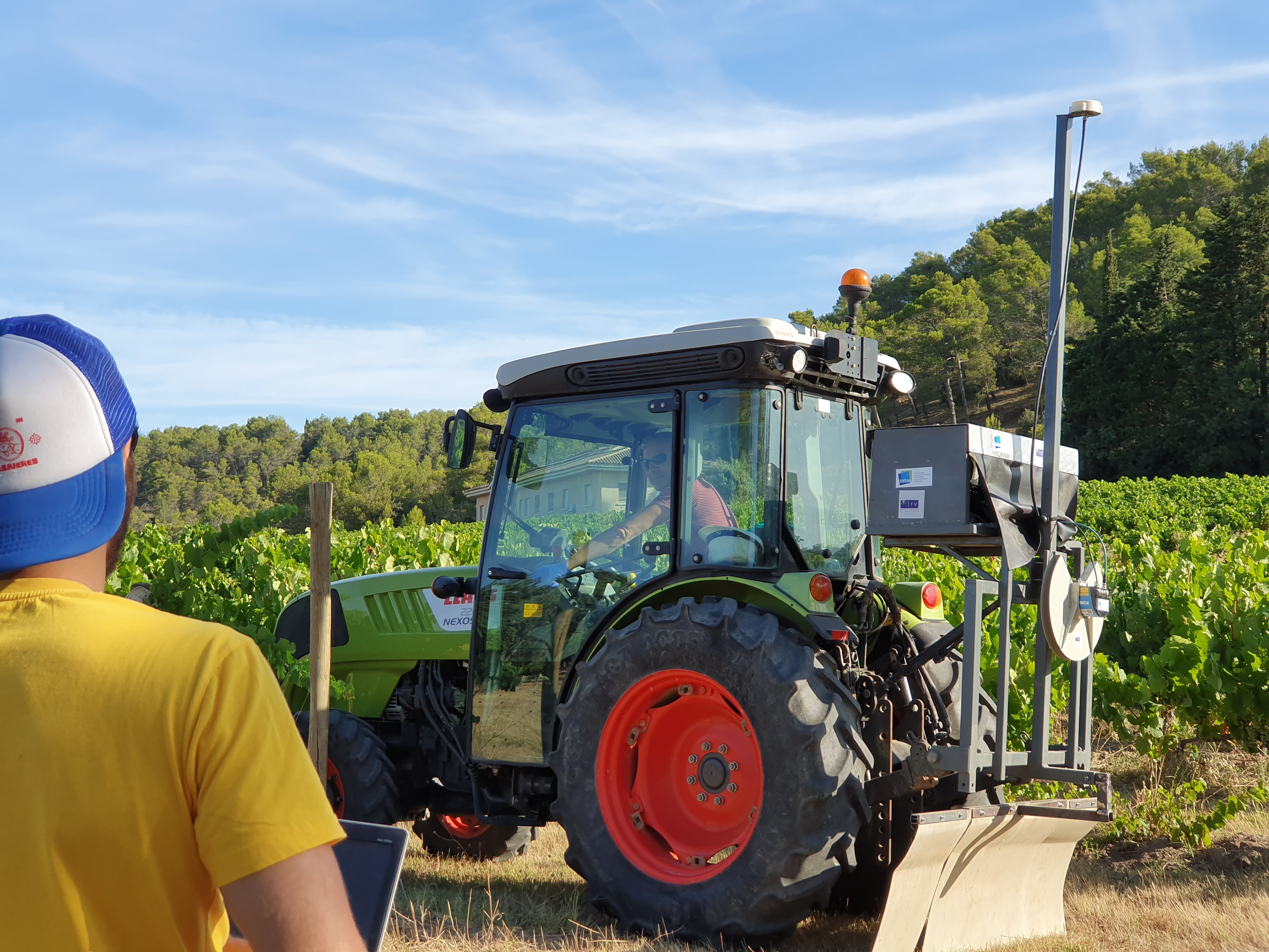 Acquisition de données 3D au champ